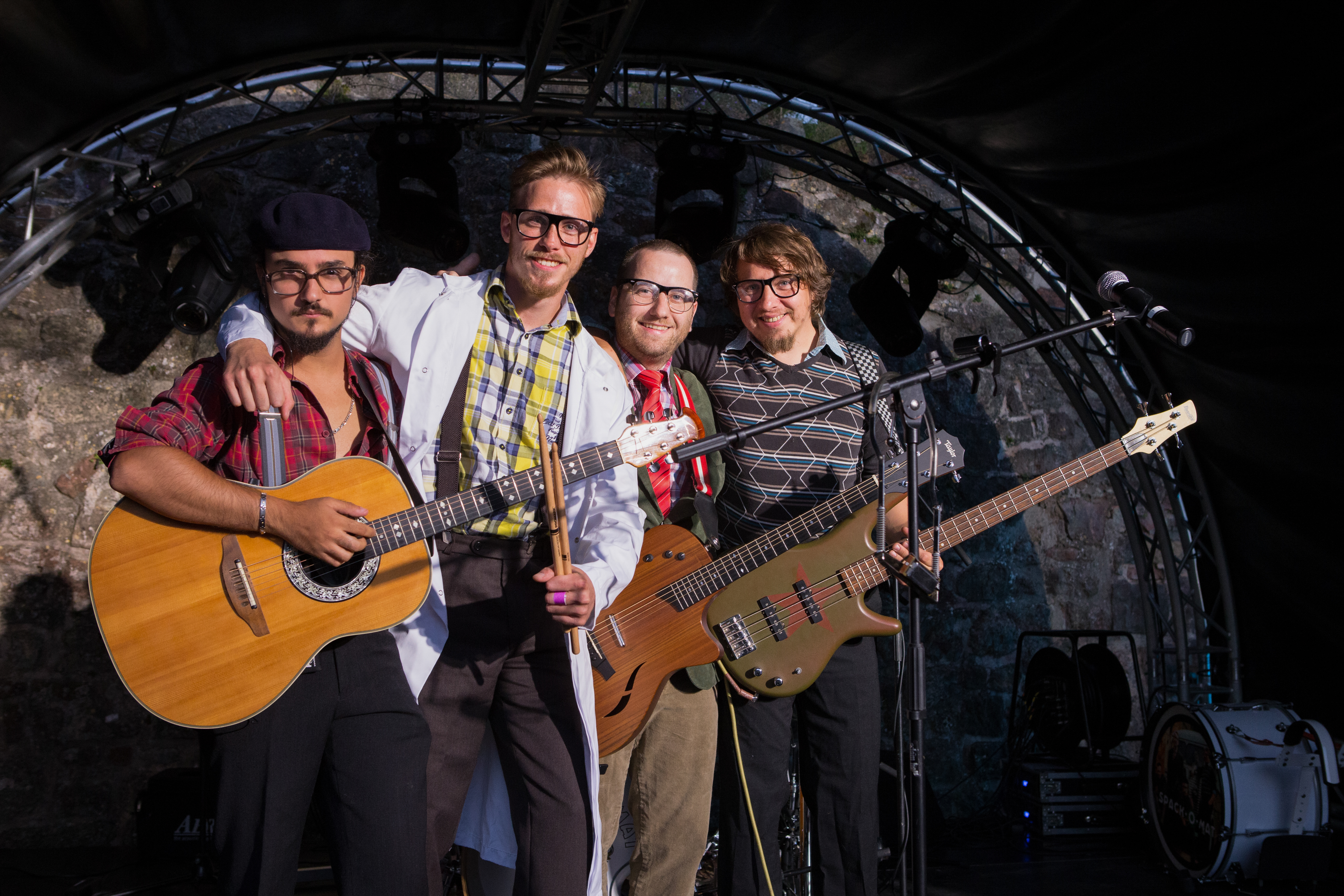 SPACK-O-MAT, de 14. August 2016 um Festival "Lights & Sound" zu Useldeng.